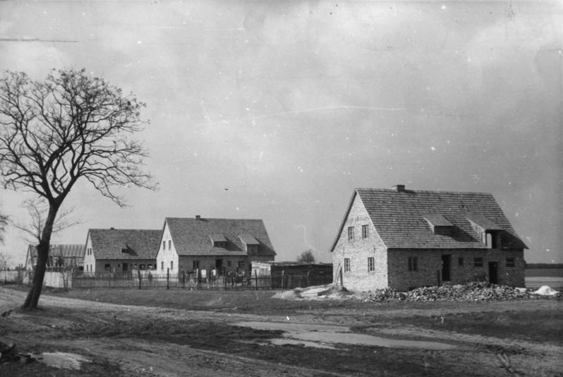 Neubauernhäuser in Rehfelde ADN-ZB-Illus-Blunck Neubauernhäuser in Rehfelde, die zum Teil bereits bewohnt sind, in der Gemeinde Rehfelde, Kreis Strausberg, Bezirk Frankfurt (Oder) 3091-49